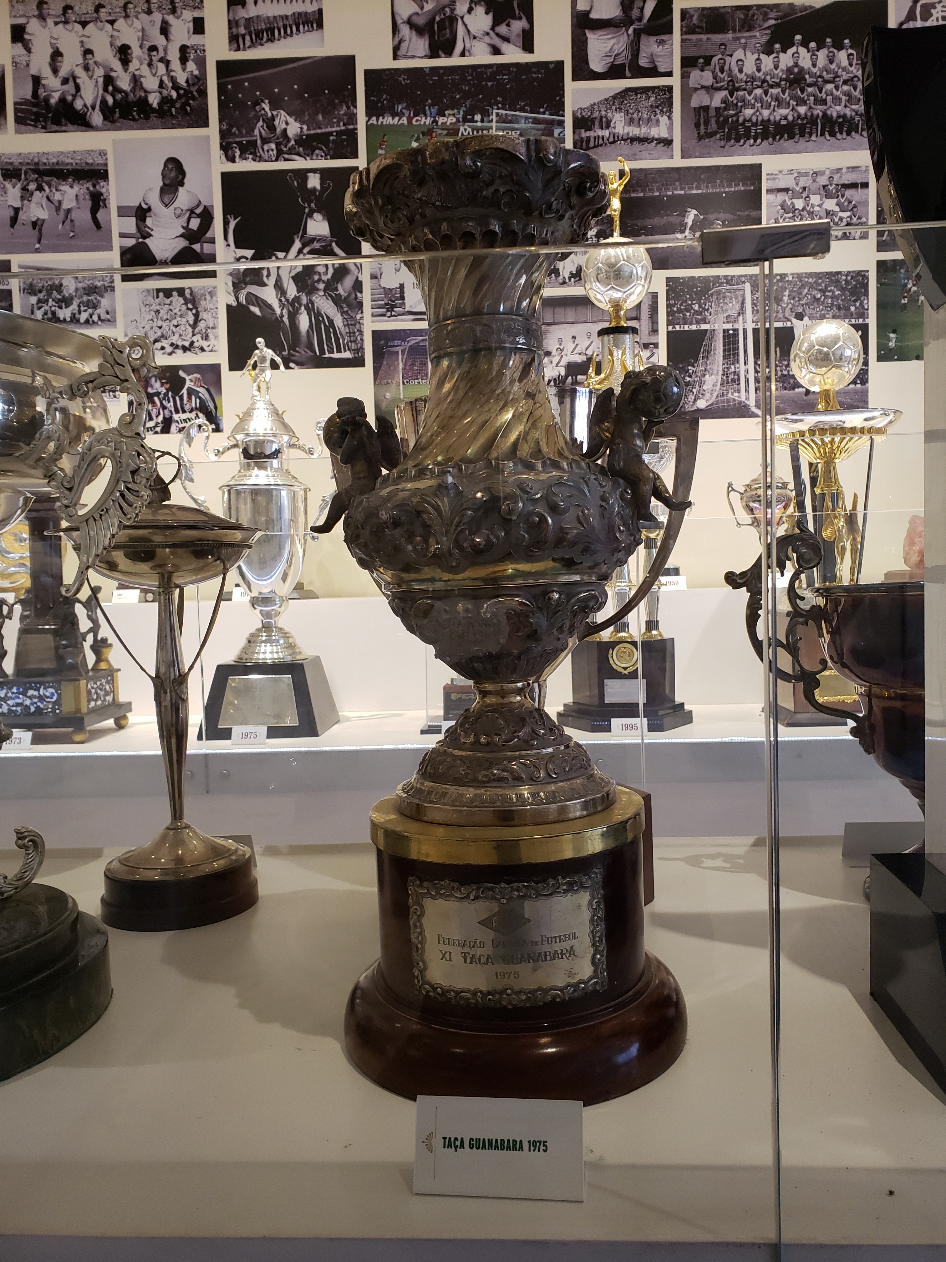 Taça Guanabara de Futebol de 1975, conquistada pelo Fluminense Football Club.